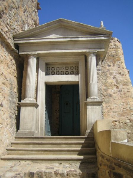 porte du fort tabarka